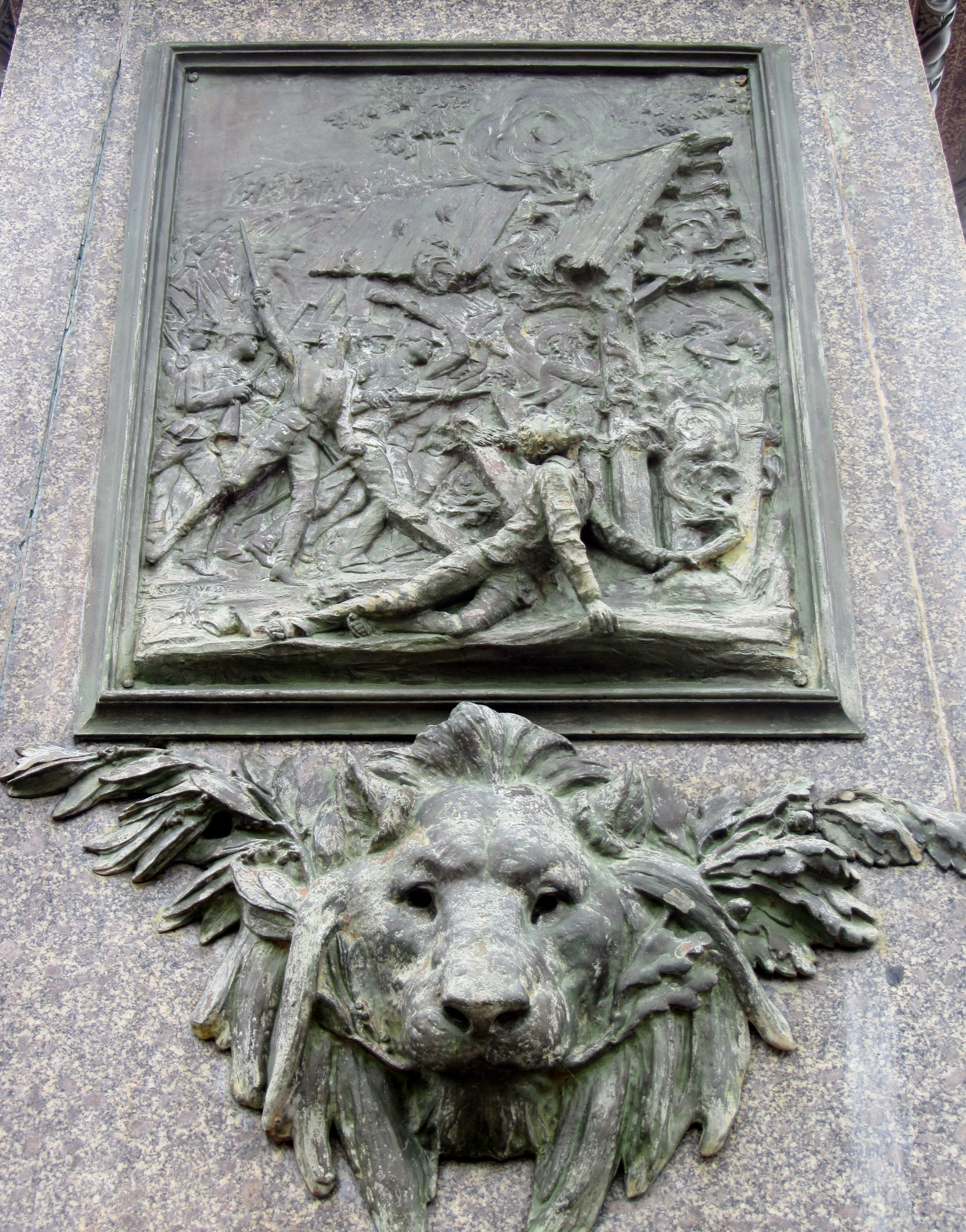 Bajorrelieve en estatua de Juan Santamaía, Alajuela, Costa Rica